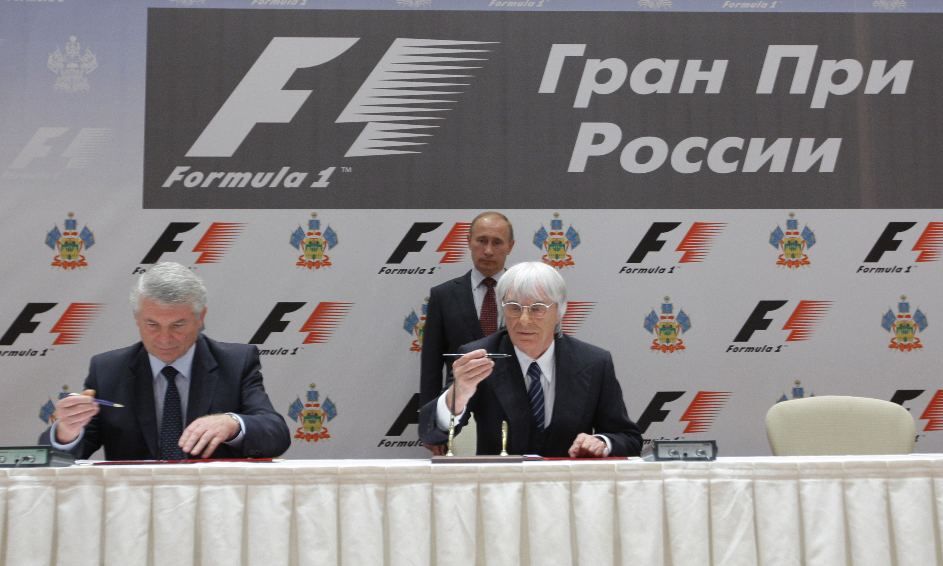 В присутствии Председателя Правительства Российской Федерации В.В.Путина были подписаны документы о проведении в Сочи этапа «Формулы-1» Гран-при России